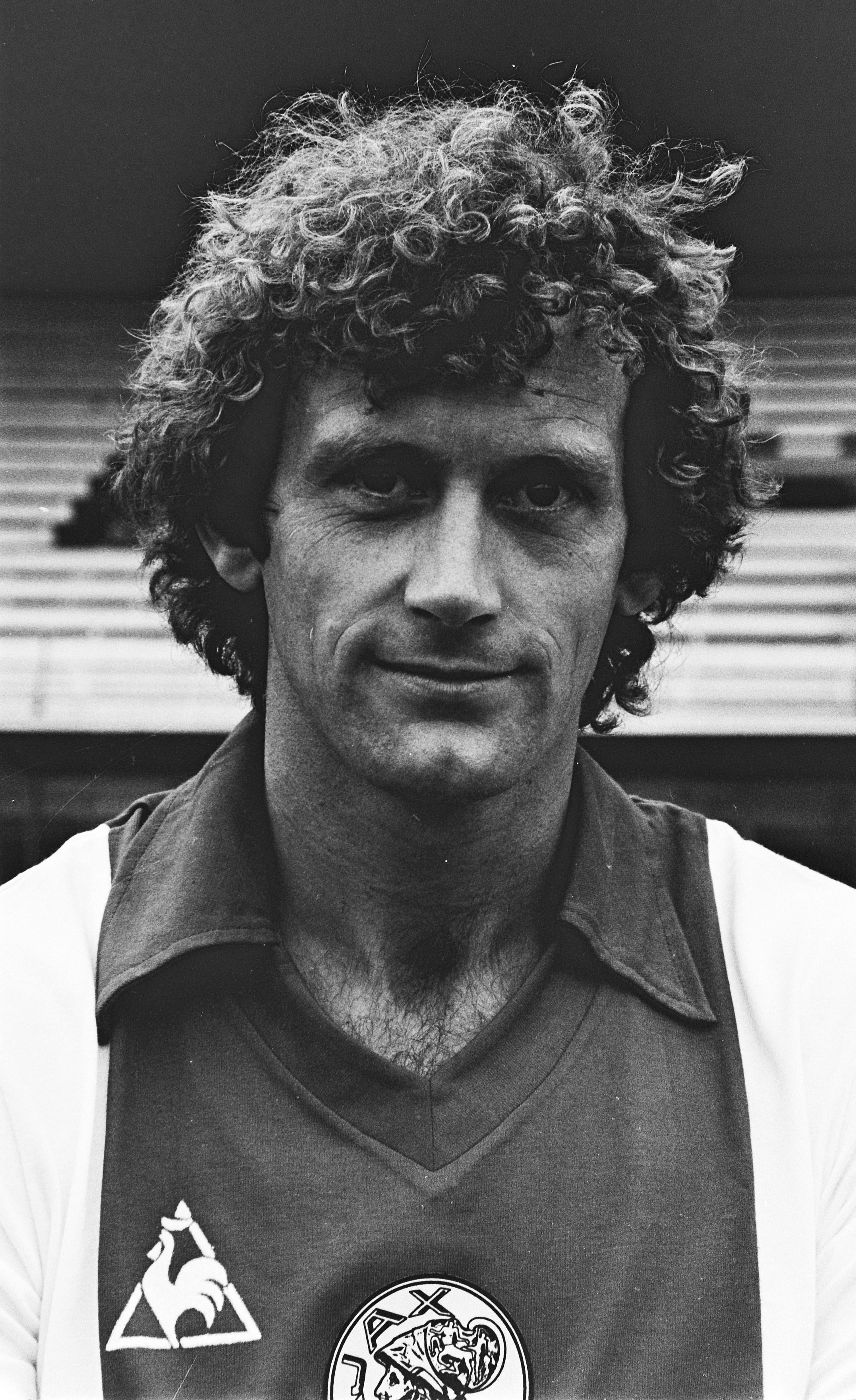 Collectie / Archief : Fotocollectie Anefo Reportage / Serie : Persdag Ajax 1980 in Amsterdam Beschrijving : Piet Hamberg Datum : 21 juli 1980 Locatie : Amsterdam, Noord-Holland Trefwoorden : portretten, sport, voetbal, voetballers Persoonsnaam : Hamberg, Piet Fotograaf : Dijk, Hans van / Anefo Auteursrechthebbende : Nationaal Archief Materiaalsoort : Negatief (zwart/wit) Nummer archiefinventaris : bekijk toegang 2.24.01.05 Bestanddeelnummer : 930-9343